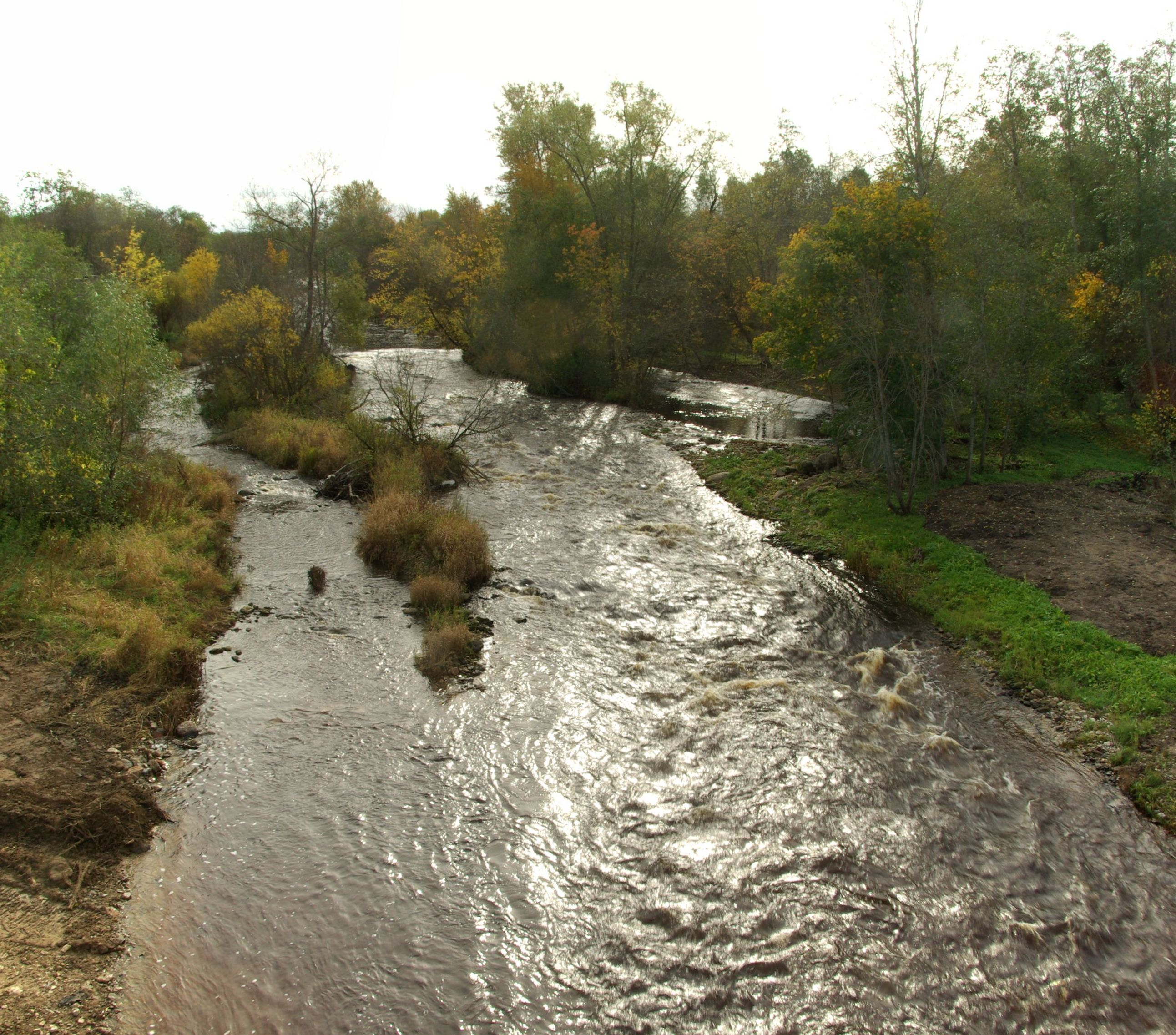 Purtse jõgi Purtse sillalt vaadatuna